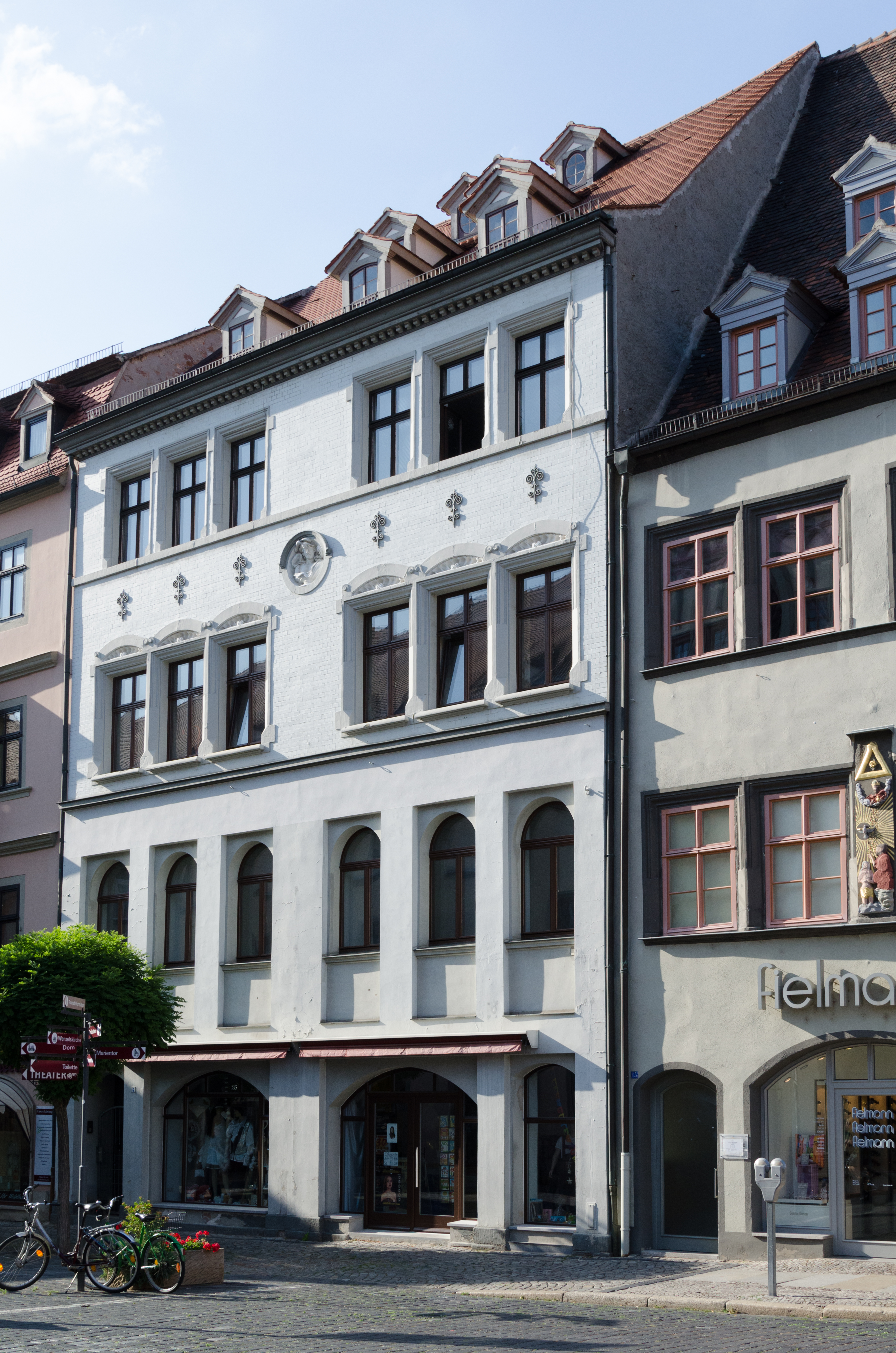 Naumburg, Markt 16